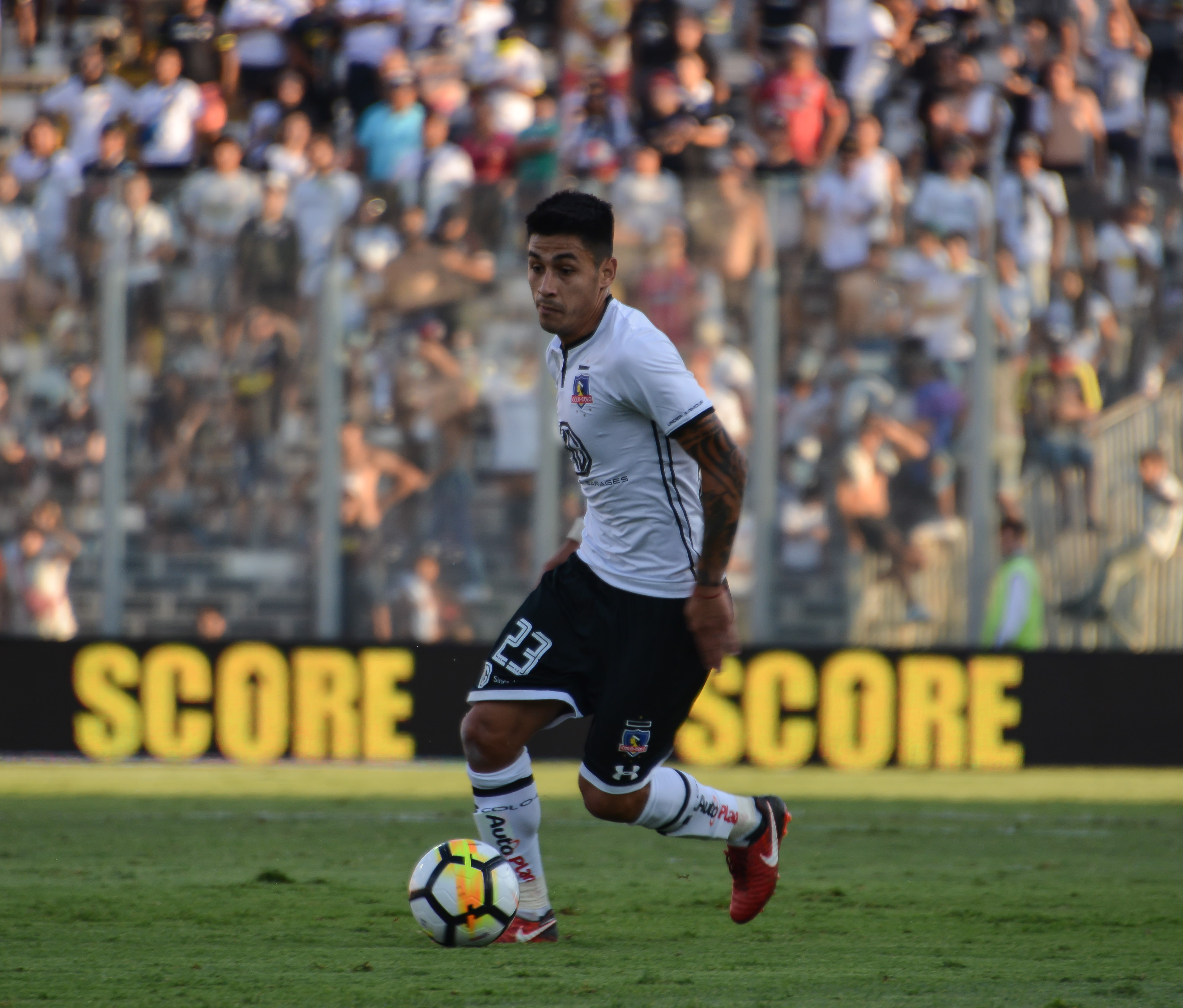 Claudio Baeza, Colo Colo v Huachipato, Estadio Monumental, Santiago, Chile.